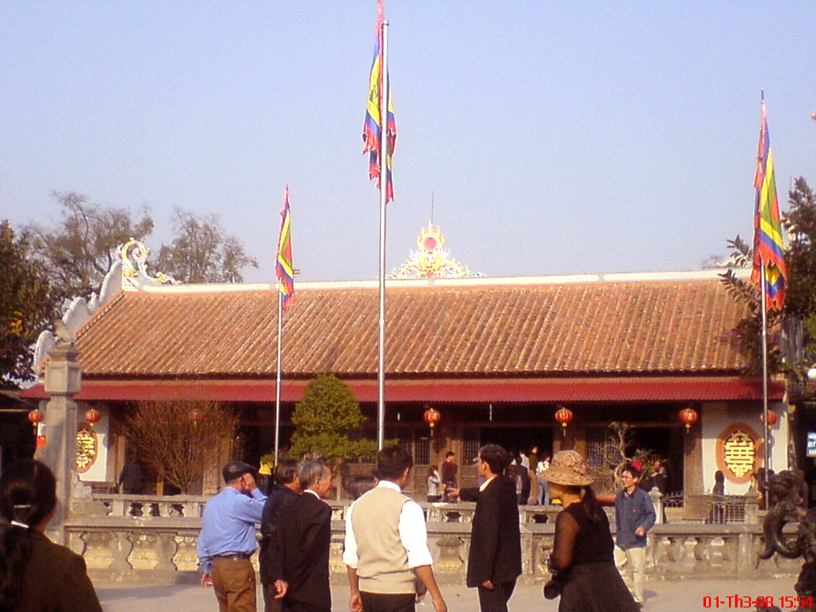 Phủ Giầy, Nam Định, Việt Nam